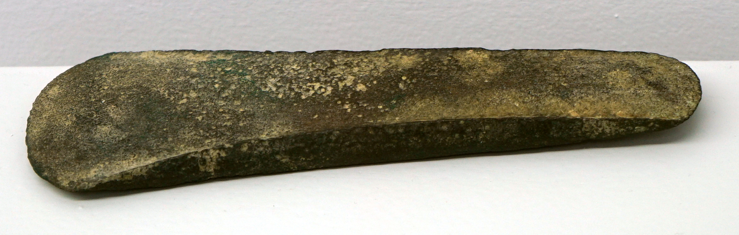 objets de l'âge du bronze, musée de Toul.